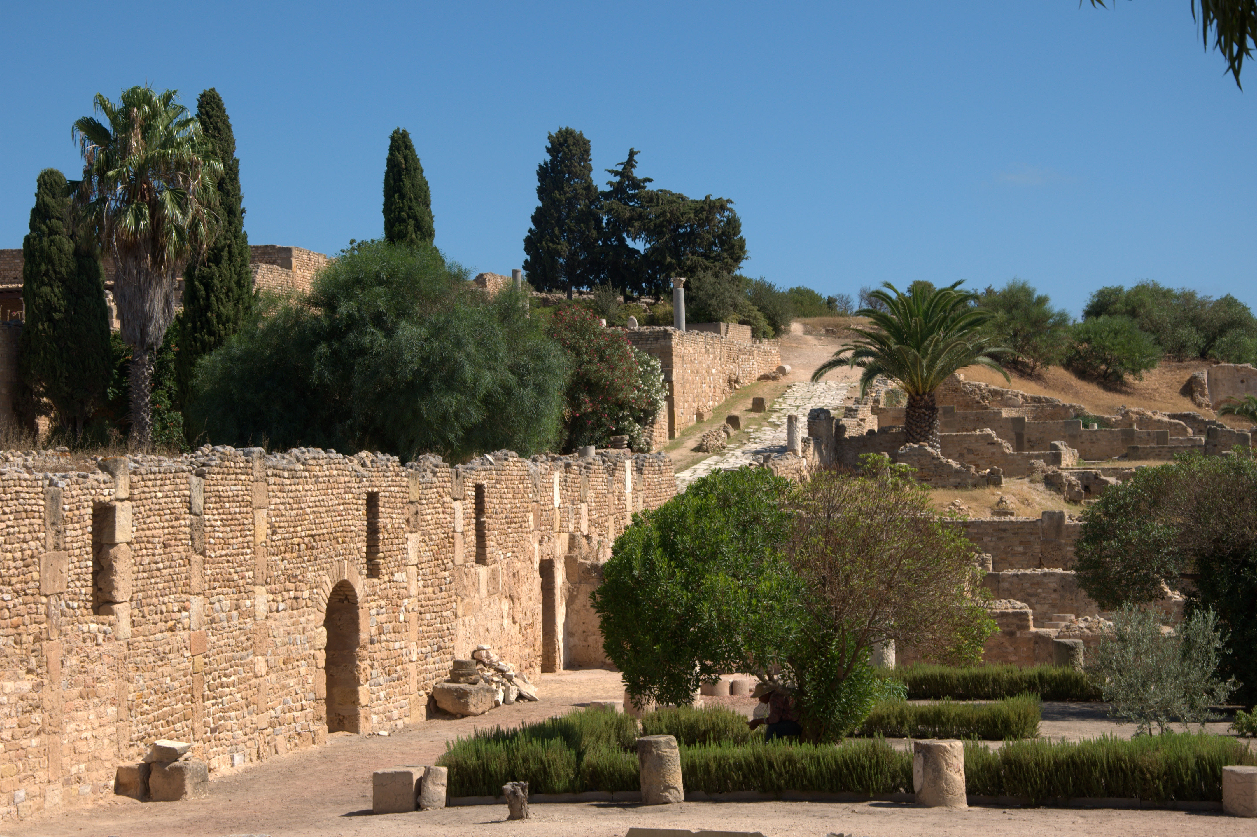 Parc des villas romaines de Carthage, villa au cryptoportique sur la gauche et au fond la villa de la volière